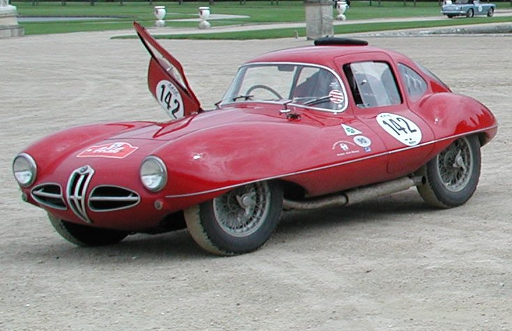 Alfa Romeo Disco Volante andere Versionen: ...